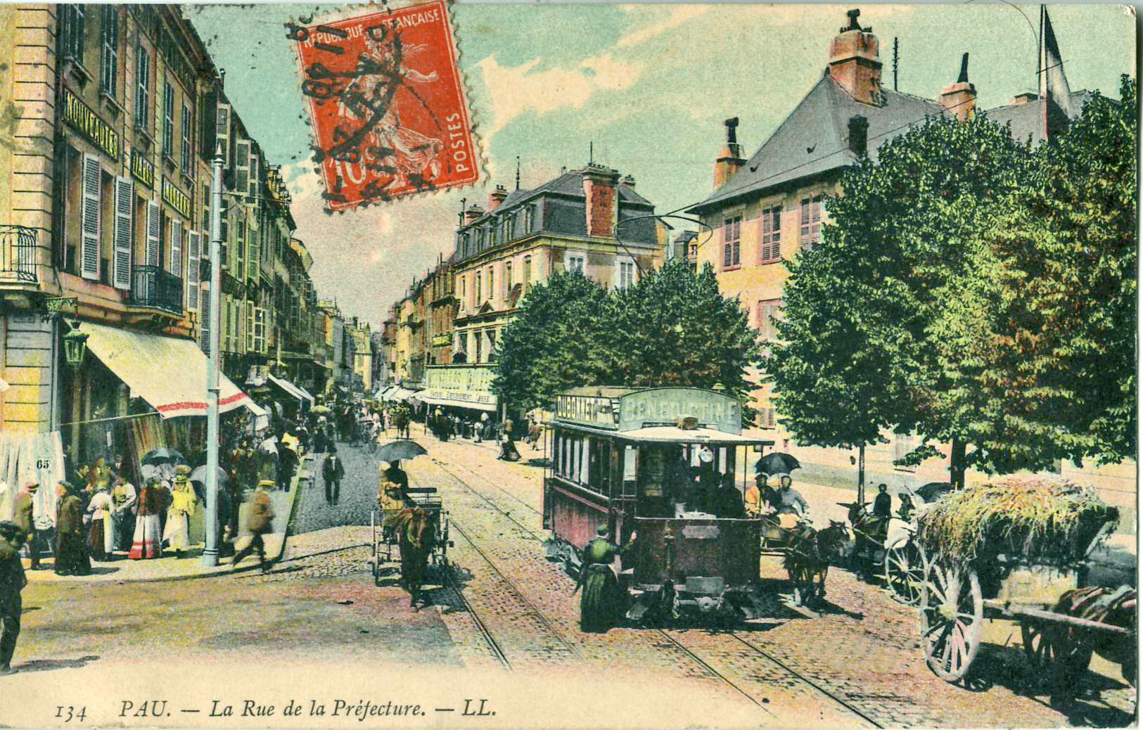 Carte postale ancienne éditée par LL, n°134 : PAU - La Rue de la Préfecture